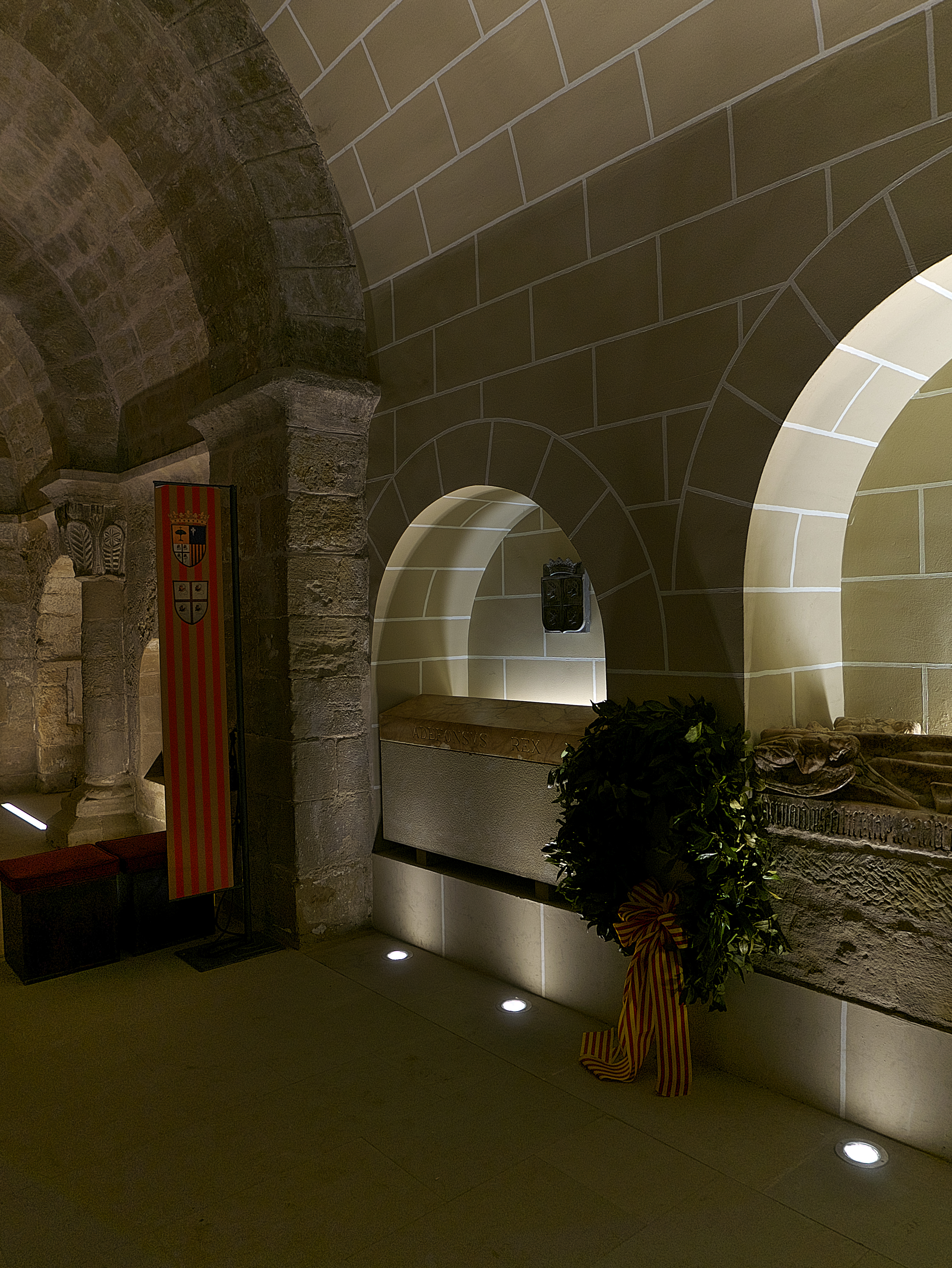 Algunos sepulcros en el lado de la Epístola.